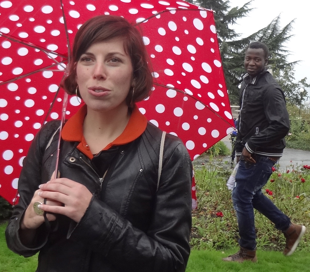 Lisa Mazzone à Lausanne, le 1er octobre 2016, lors de la manifestation pour le droit d'asile « STOP aux renvois Dublin, STOP aux violations des droits humains ».